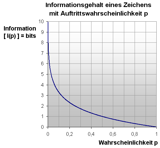 Informationstheorie - Entropie: Informationsgehalt eines Zeichens für diskrete Auftrittswahrscheinlichkeit information theorie - entropy: Amount of information of a sign